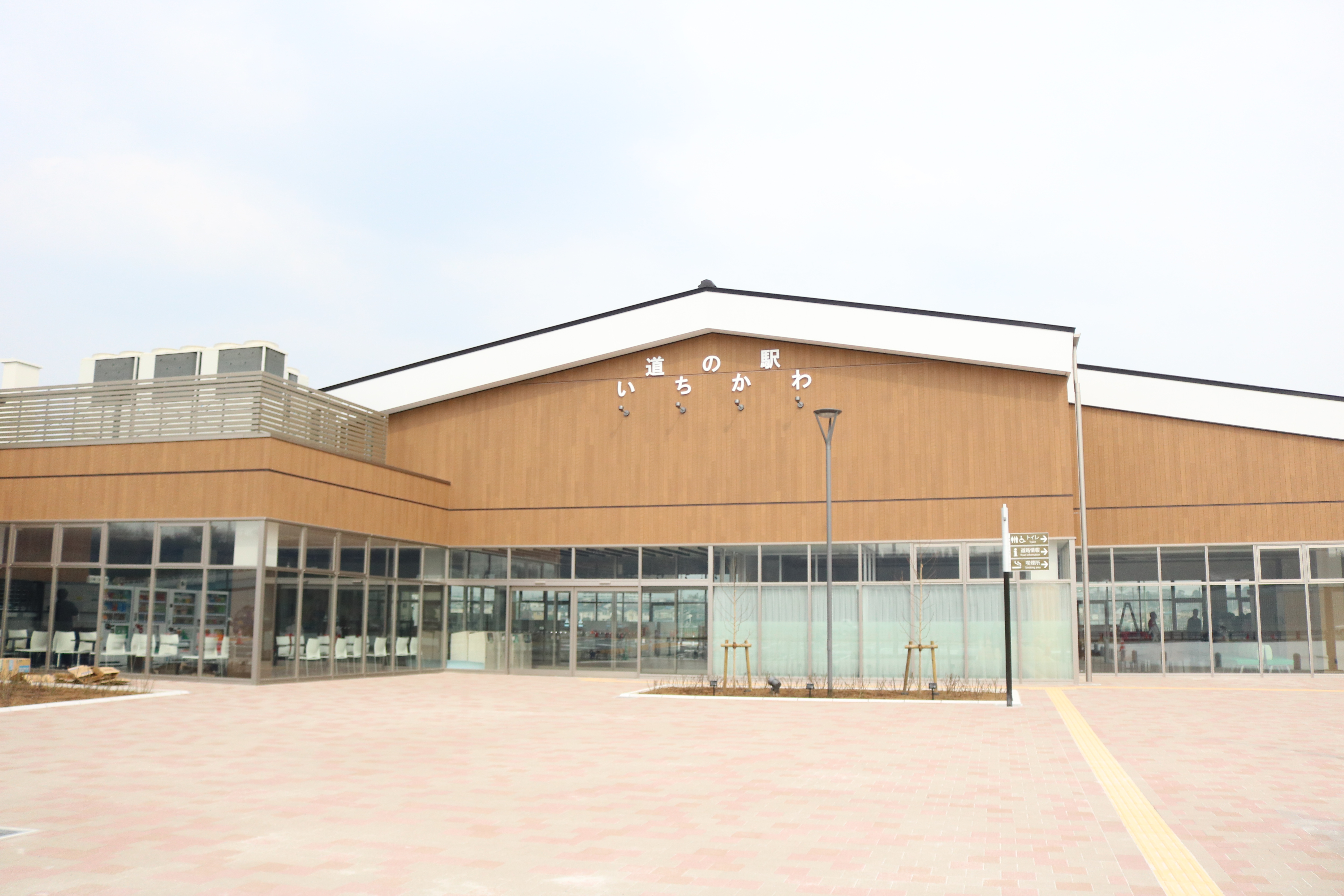 道の駅いちかわ外観